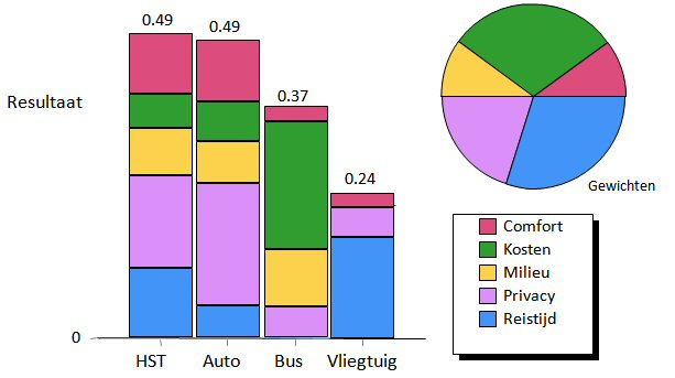 Ranking graph in MCA